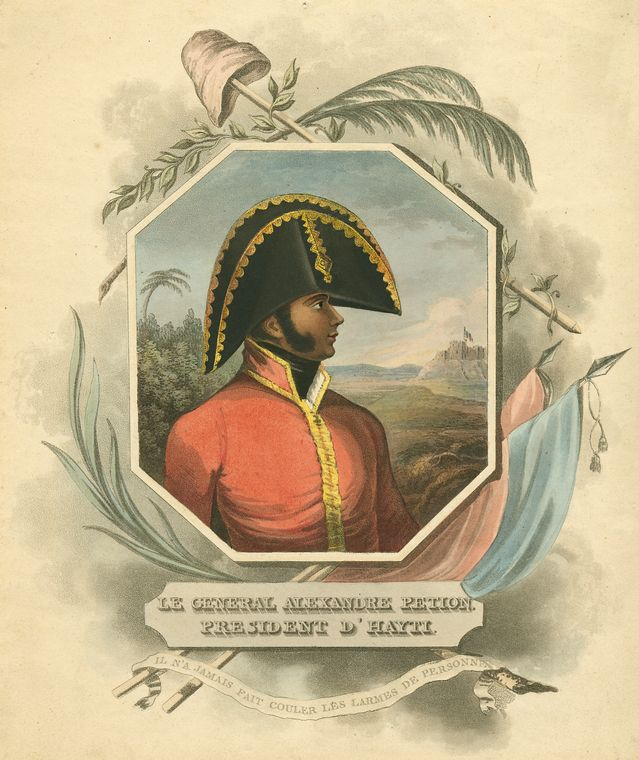 Portrait du général Alexandre Pétion.